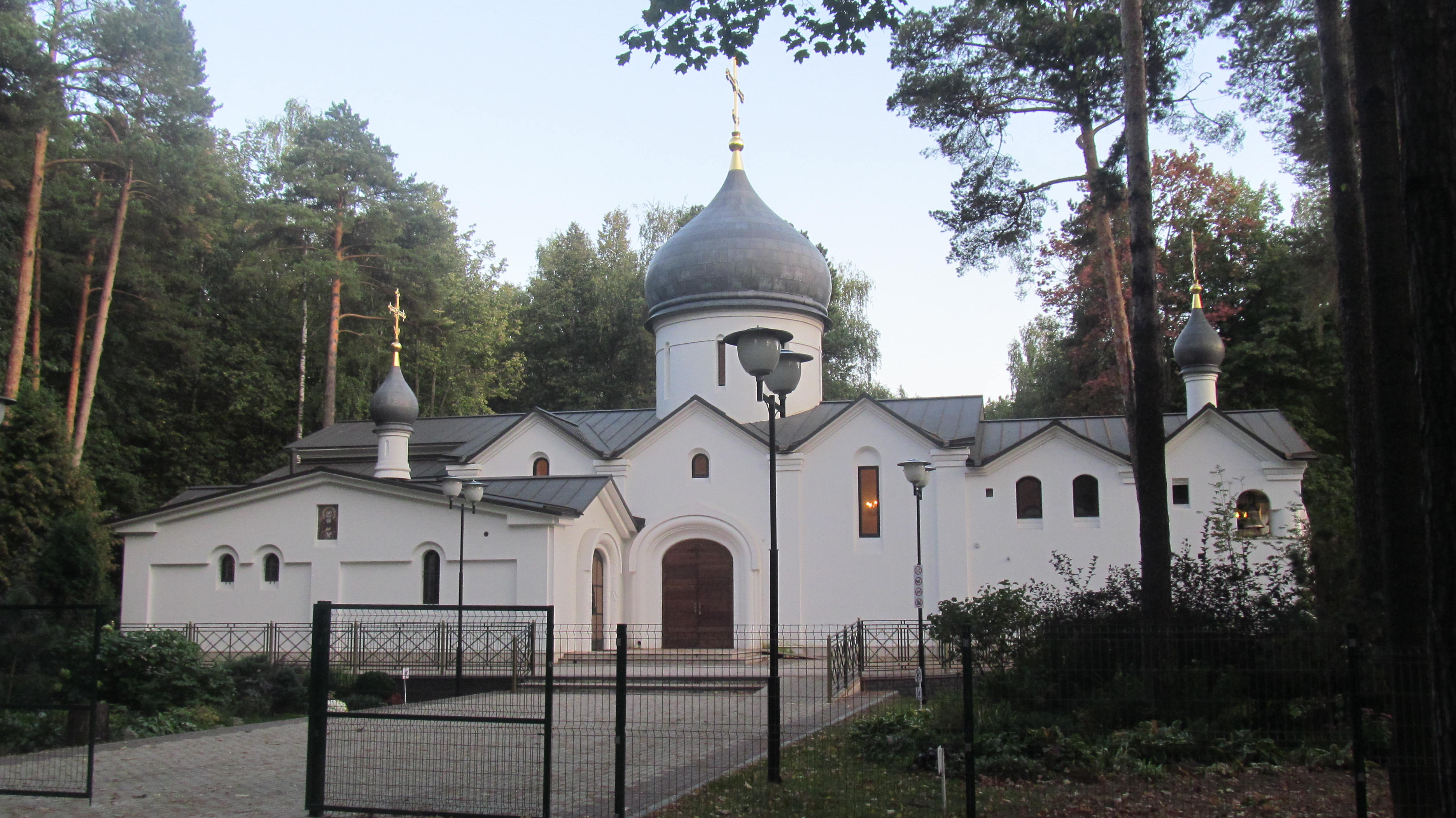 Храм Священномученика Владимира в г. Королёве Моск. обл. (каменное здание)